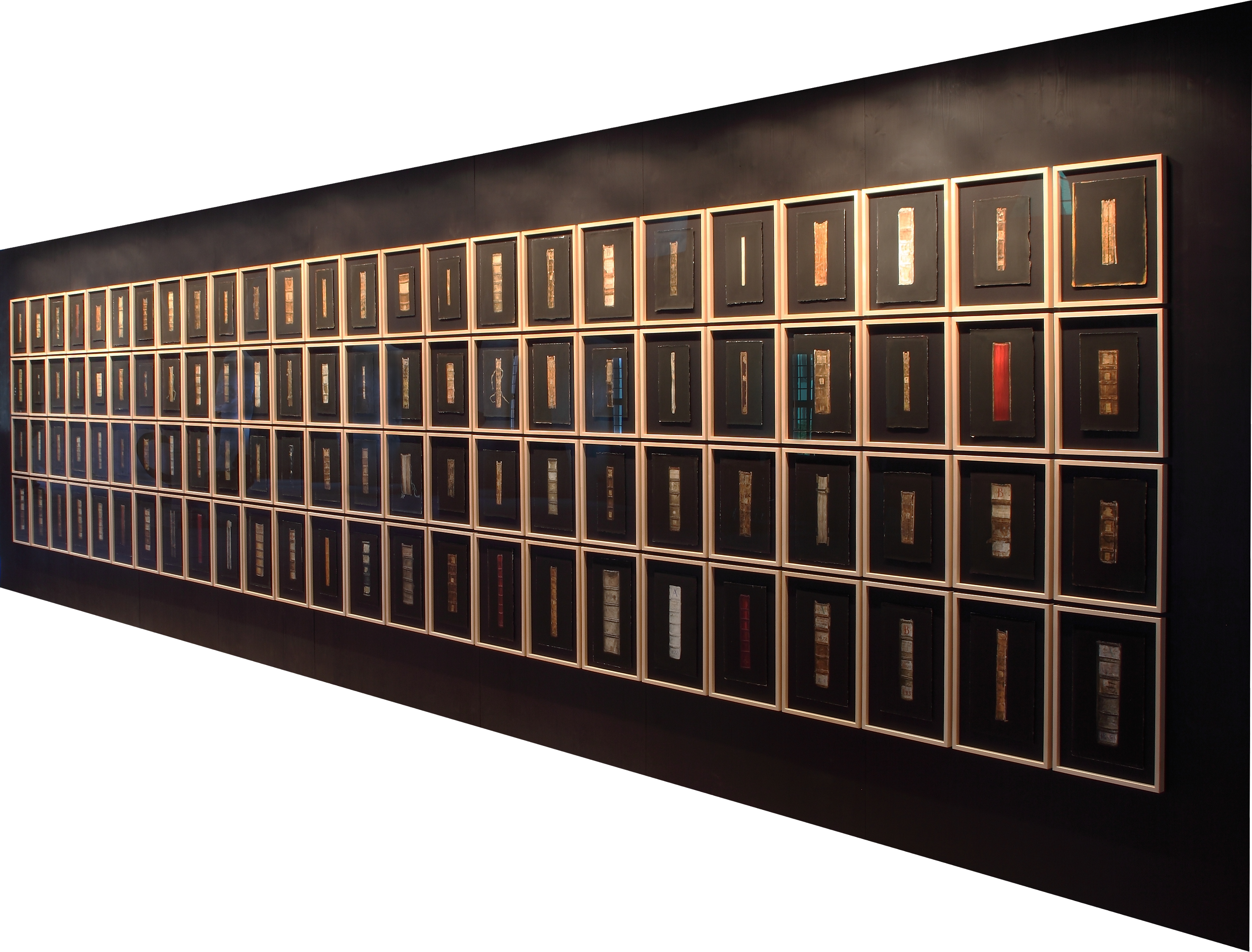 Kunstwerk des Künstlers Hannes Möller